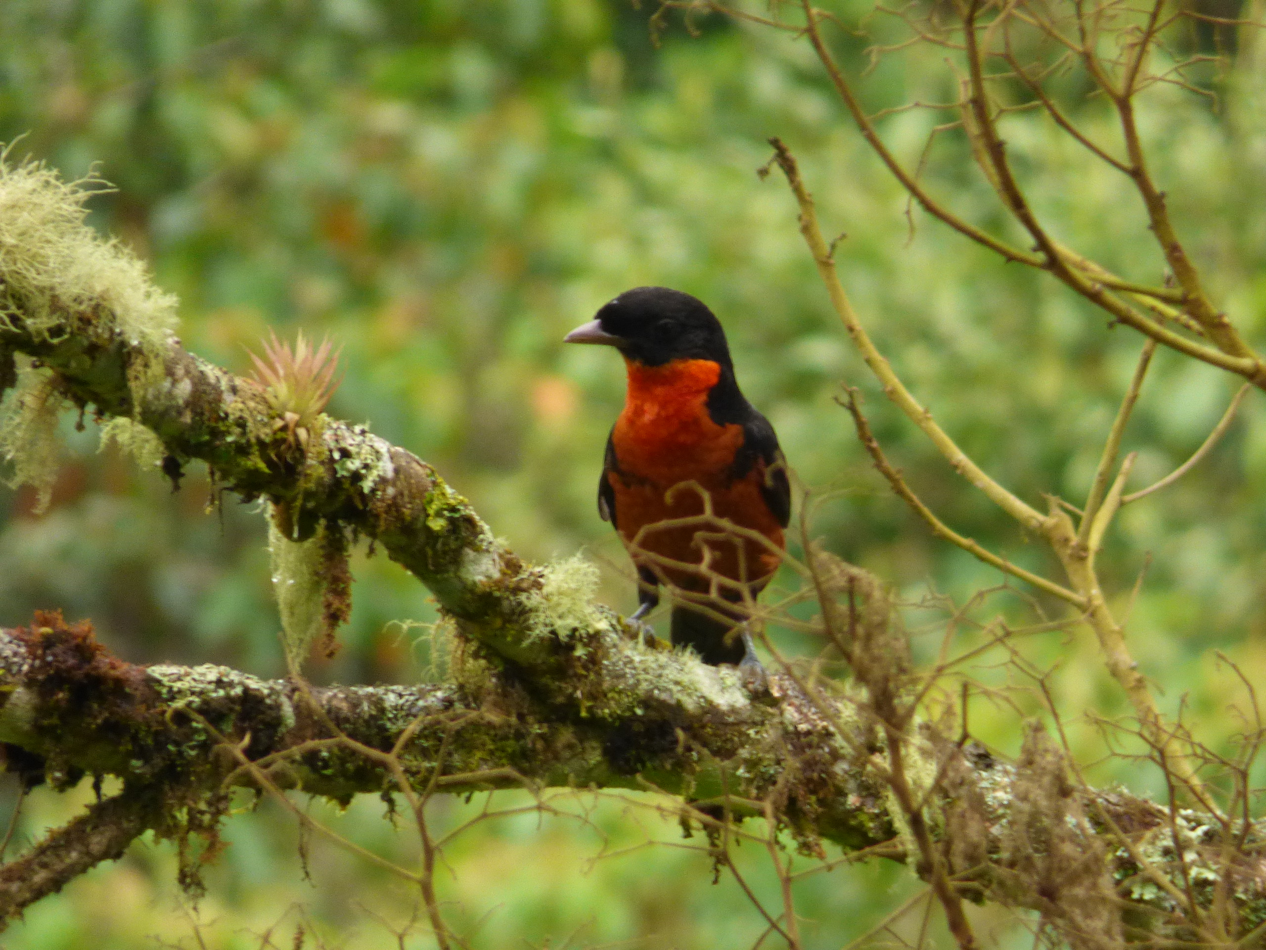 Pyroderus scutatus (Toropisco)